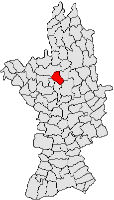 Categorie:Hărţi ale judeţului Olt